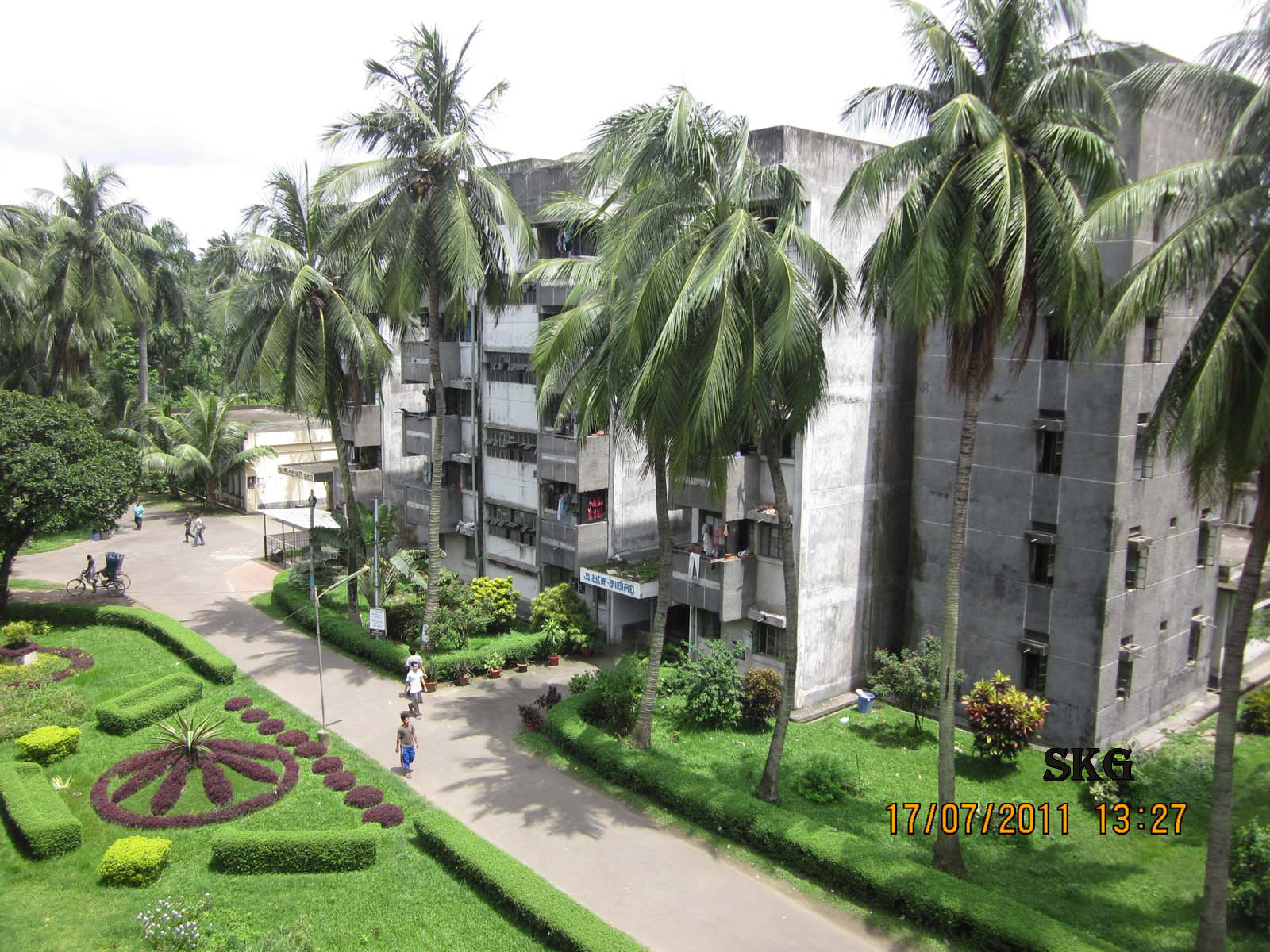 অক্টোবর স্মৃতি ভবন